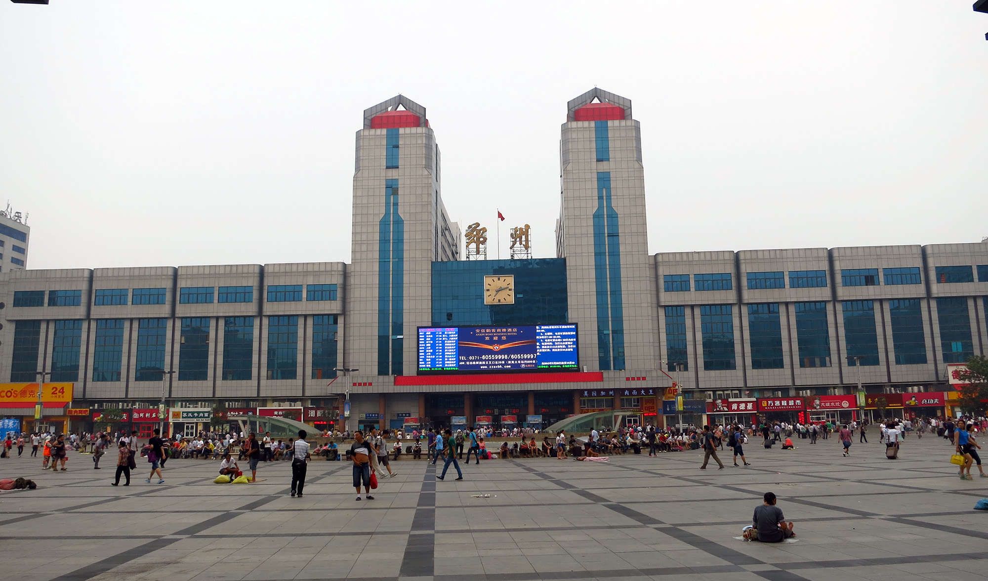 河南省郑州站